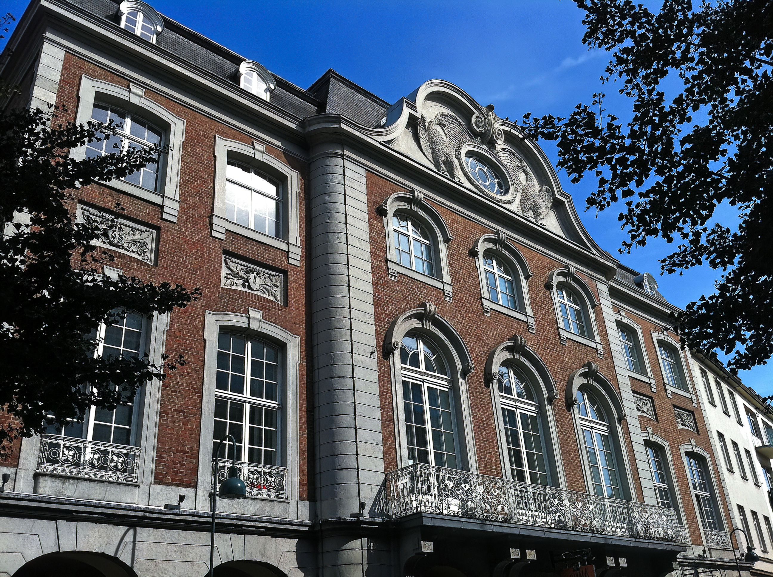 Fassade des Alten Kurhauses (Neue Redoute) an der Komphausbadstraße in Aachen. Architekt: J.J. Couven